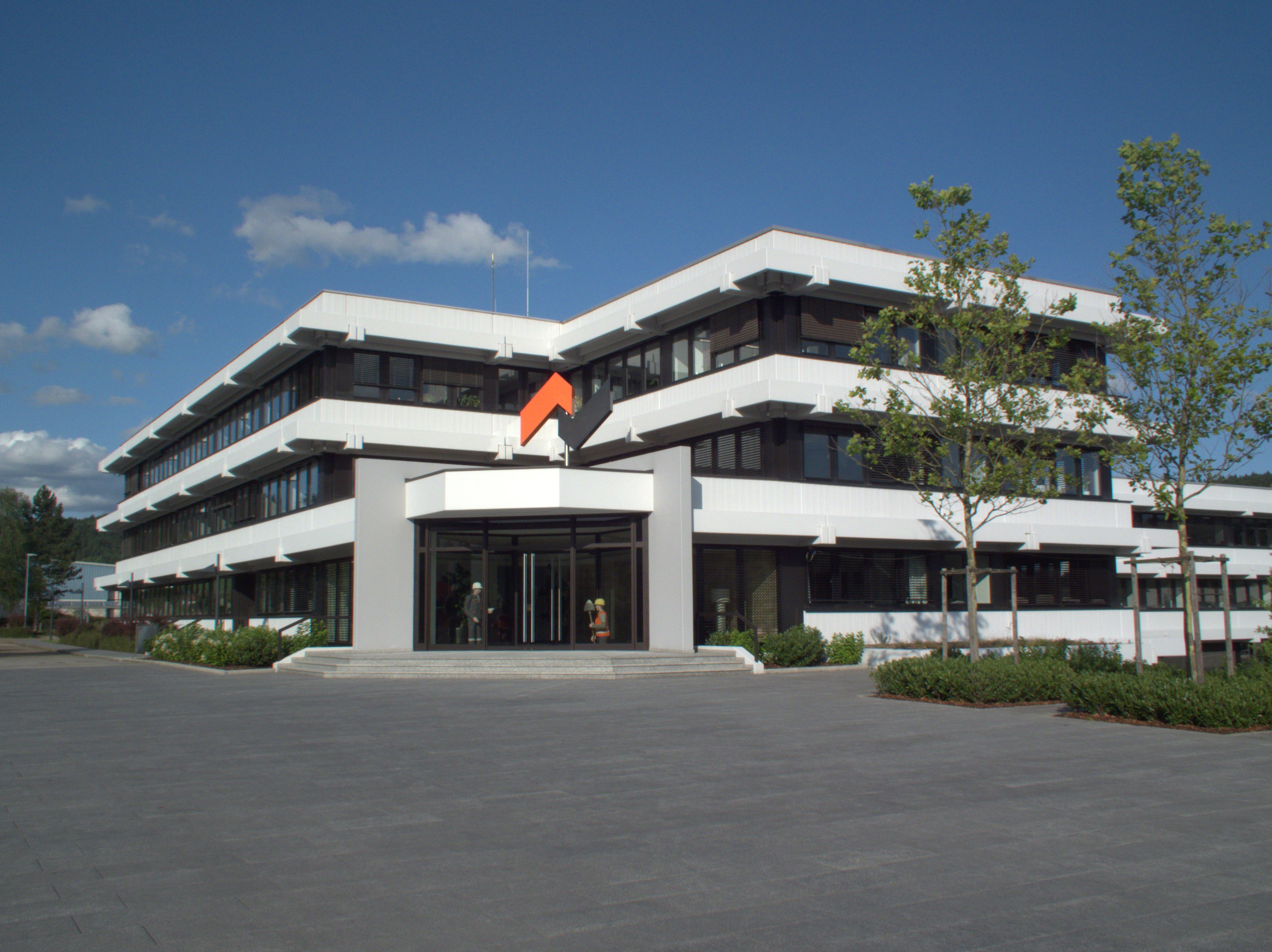 Zentrale der Fa. Klebl im Neumarkter Stadtteil Lähr